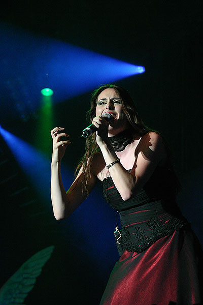 Sharon den Adel, Sängerin von Within Temptation bei einem Konzert bei dem Festival Mera Luna in Hildesheim 2004